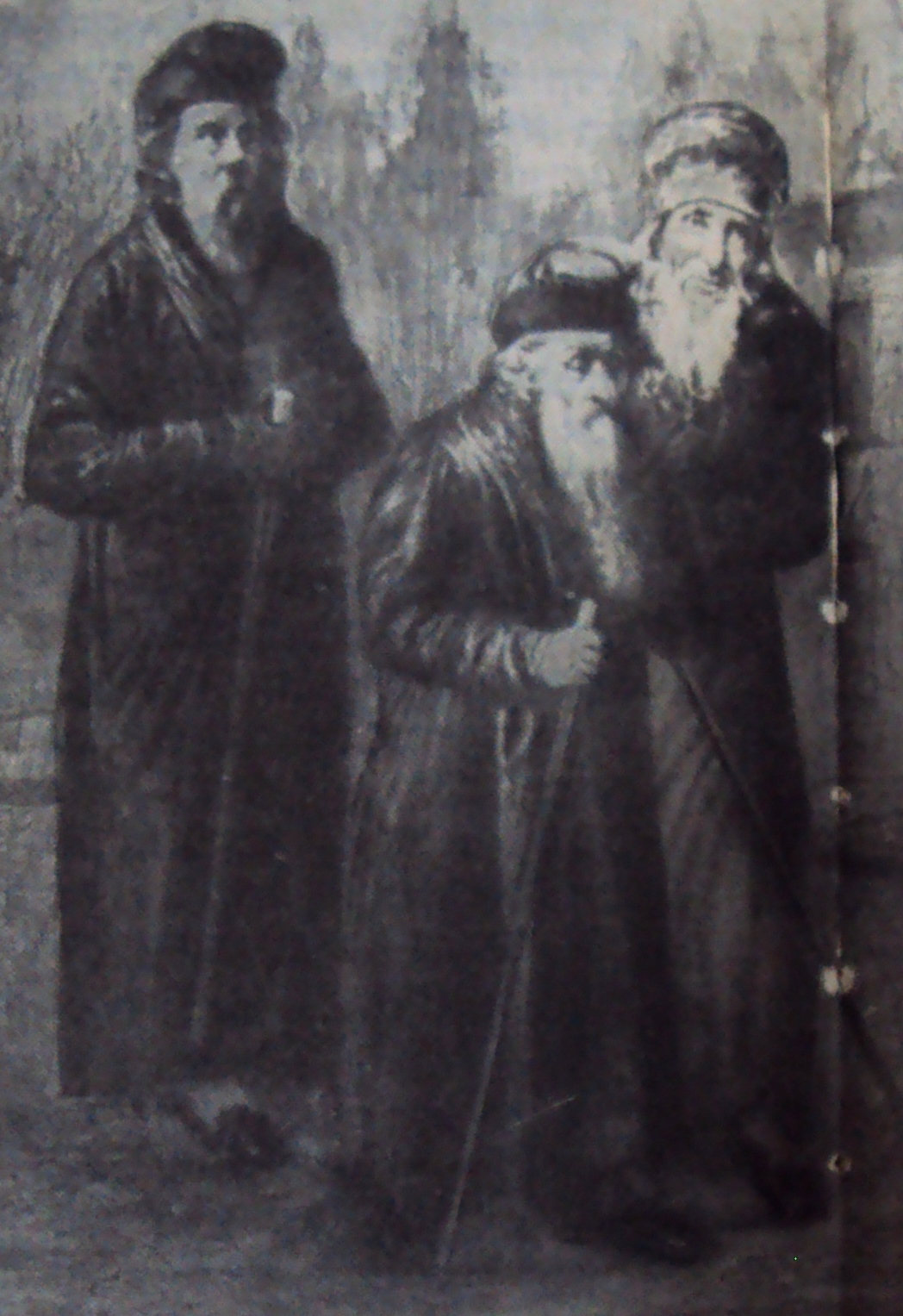 רבי עקיבא איגר עם דייני העיר פוזנא ברחוב העיר